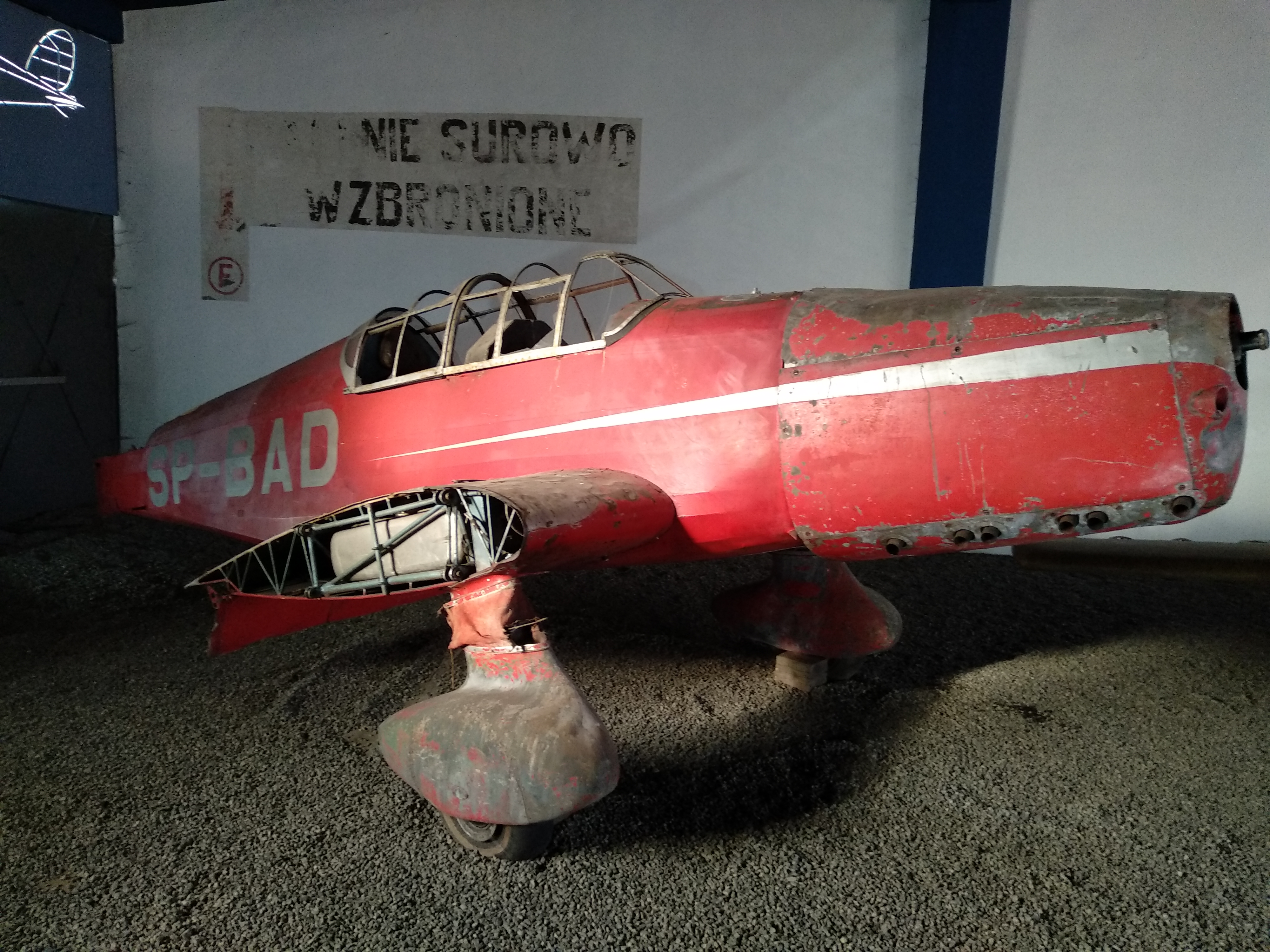 Prototyp polskiego samolotu szkolno-akrobacyjnego LWD Zuch SP-BAD, eksponowany w Muzeum Lotnictwa Polskiego w Krakowie.